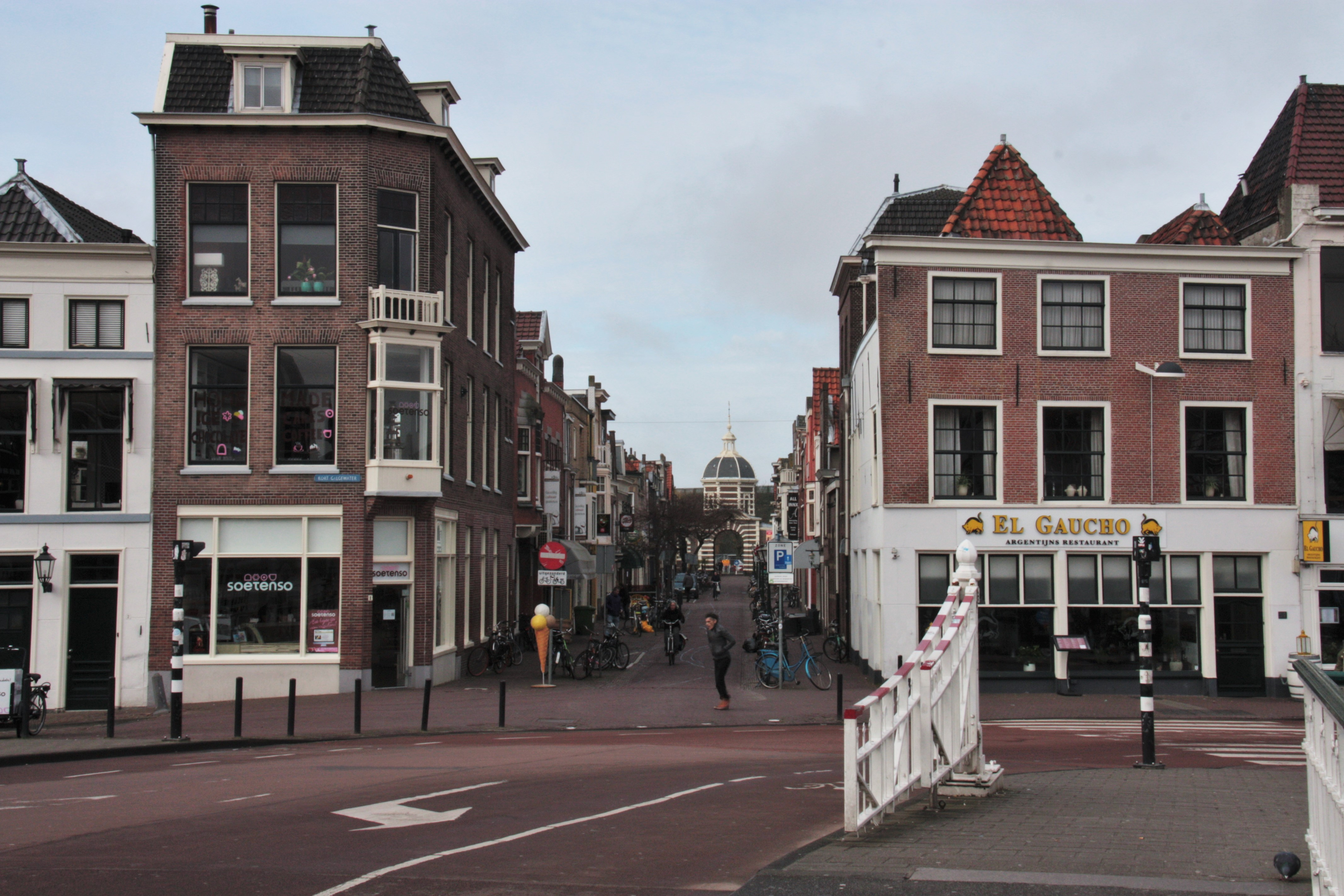 Вулиця Морсстрат (Morsstraat), Лейден, Нідерланди